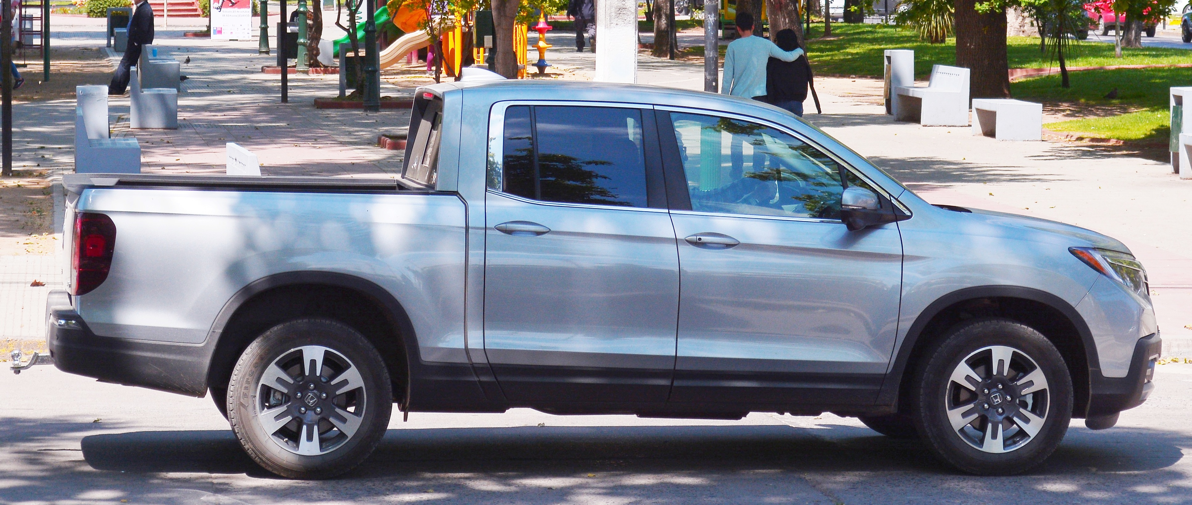 Honda Ridgeline RTL-T 2017